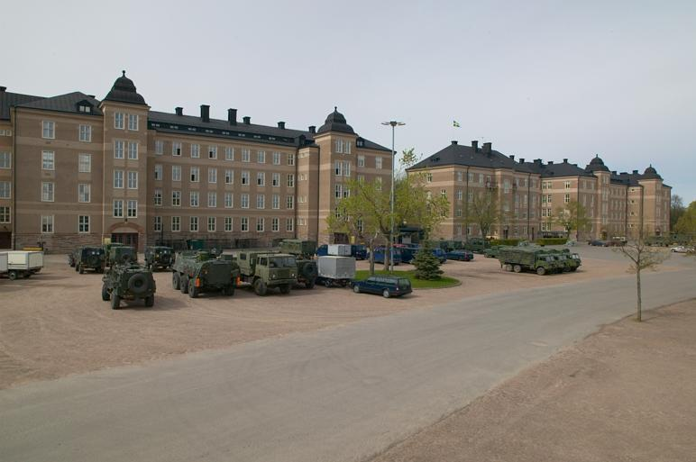 Skaraborgs regemente. Kaserngård med kasern II, kanslihus och kasern I, nybyggnadsår 1913.